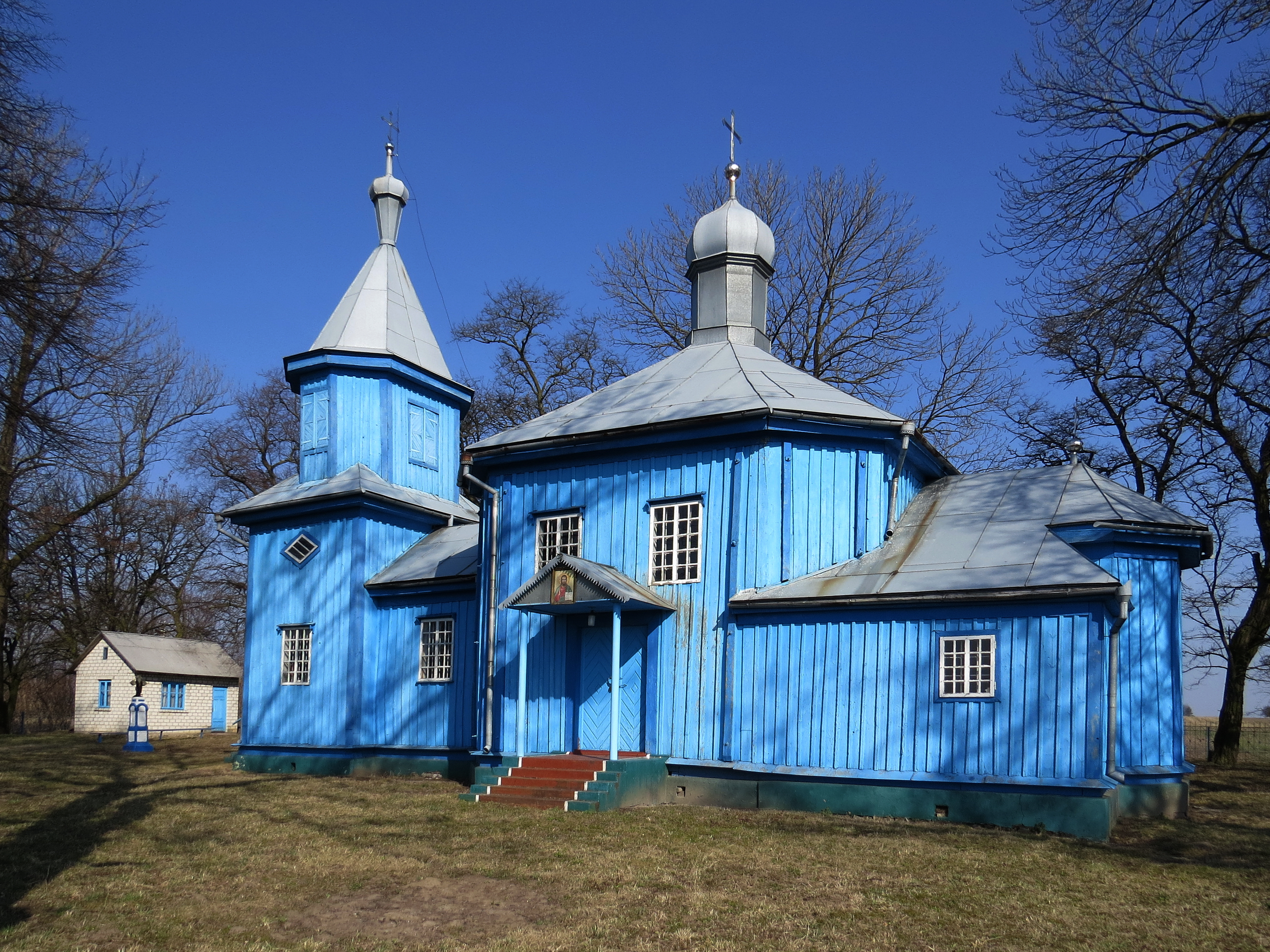 Петропавлівська церква (дер.) (1877 рік) - вигляд з південного сходу - с.Вощатин (вул. 1 Травня) Володимир-Волинський район Волинська область Україна